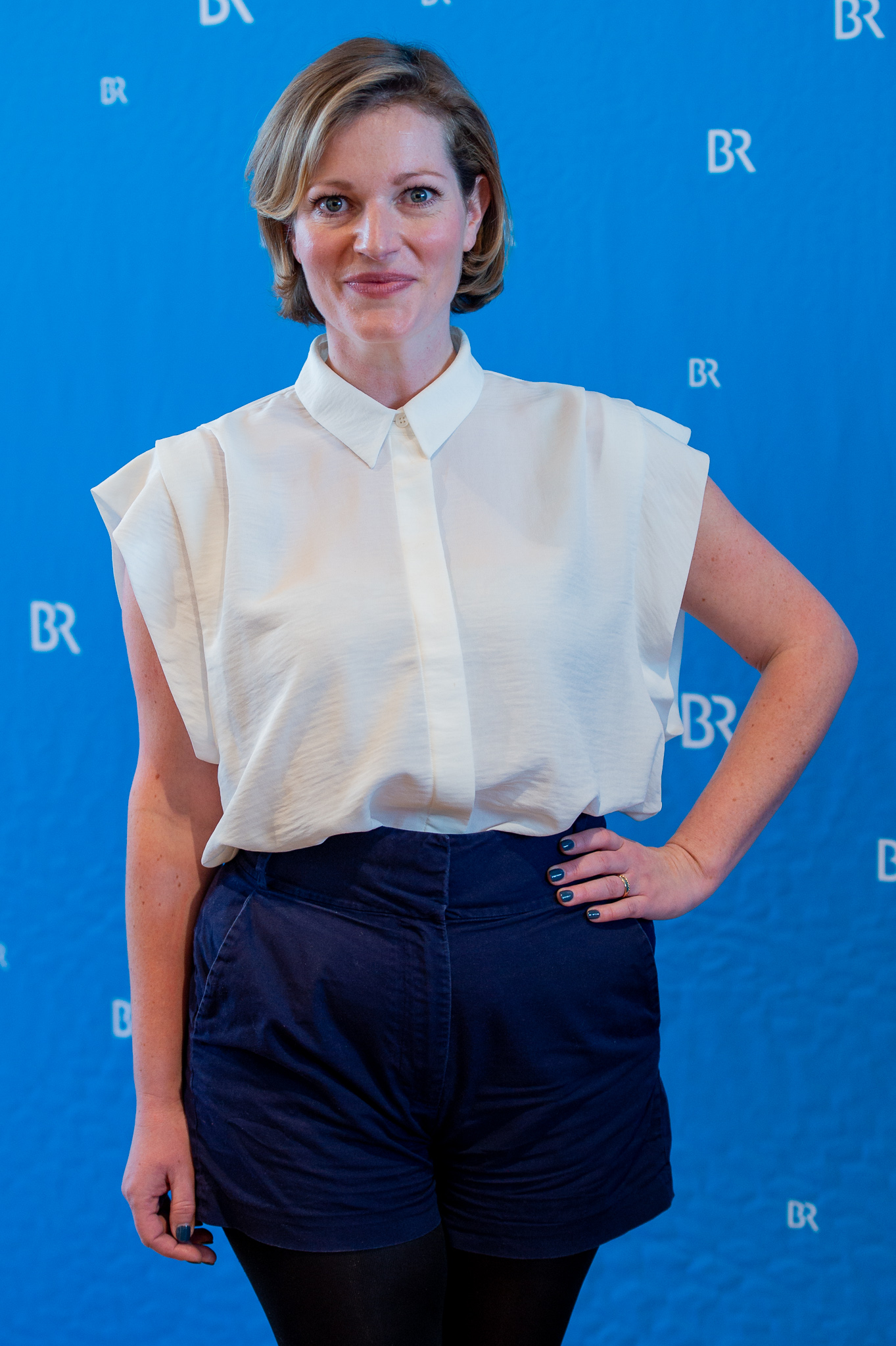 BR,Bayerischer Rundfunk,Bayerisches Fernsehen,Filmbrunch 2019,Ina Meling,Literaturhaus München